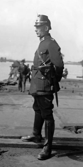 Der feierliche Stapellauf des größten Ozeandampfers "Bremen" fand unter Anwesenheit des Reichspräsidenten von Hindenburg in Bremen statt. Die riesigen Ankerketten am Rumpf der "Bremen", welche das Schiff nach dem Stapellauf festhalten.